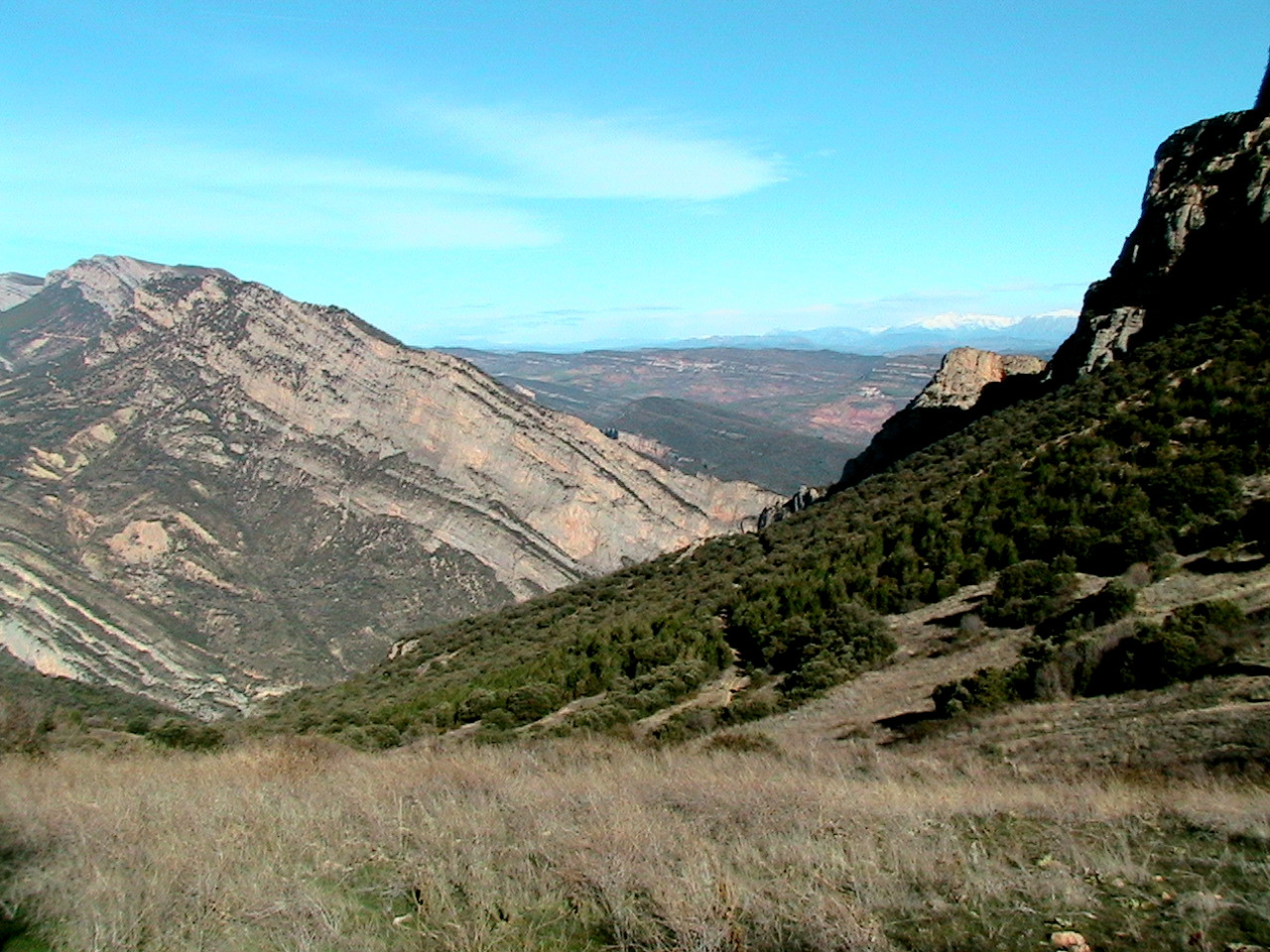 El Serrat de Fontfreda al Montsec d'Ares des de Rúbies This is a a photo of a natural area in Catalonia, Spain, with id: ES510192